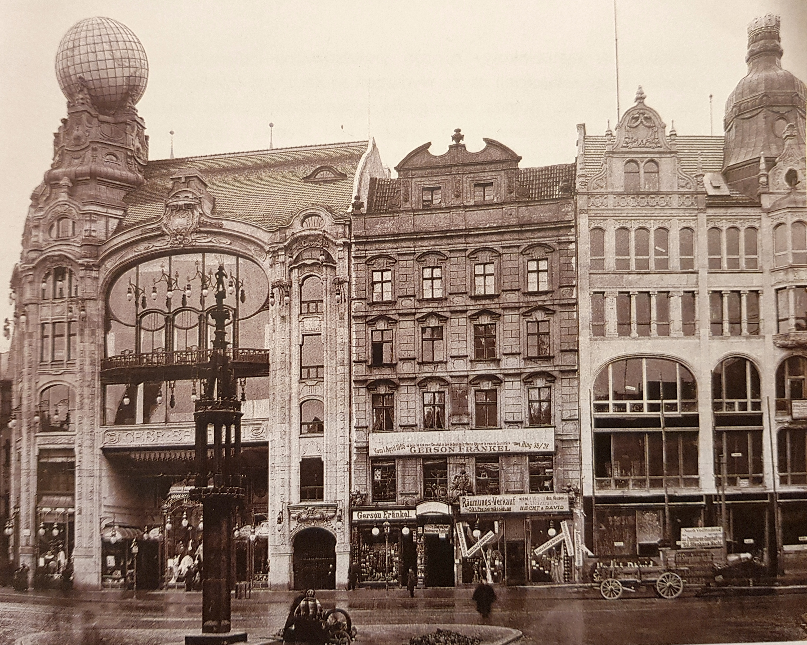 Pierzeja wschodnia wrocławskiego Rynku: Kamienica Pod Złotą Koroną (nr29),Kamienica Stary Ratusz (nr 30) : Dom handlowy Braci Barasch (Warenhaus Gebrüder Barasch) we Wrocławiu (po lewej nr 31-32), 1905.